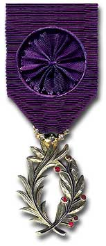 Avers Officier des Palmes Académique